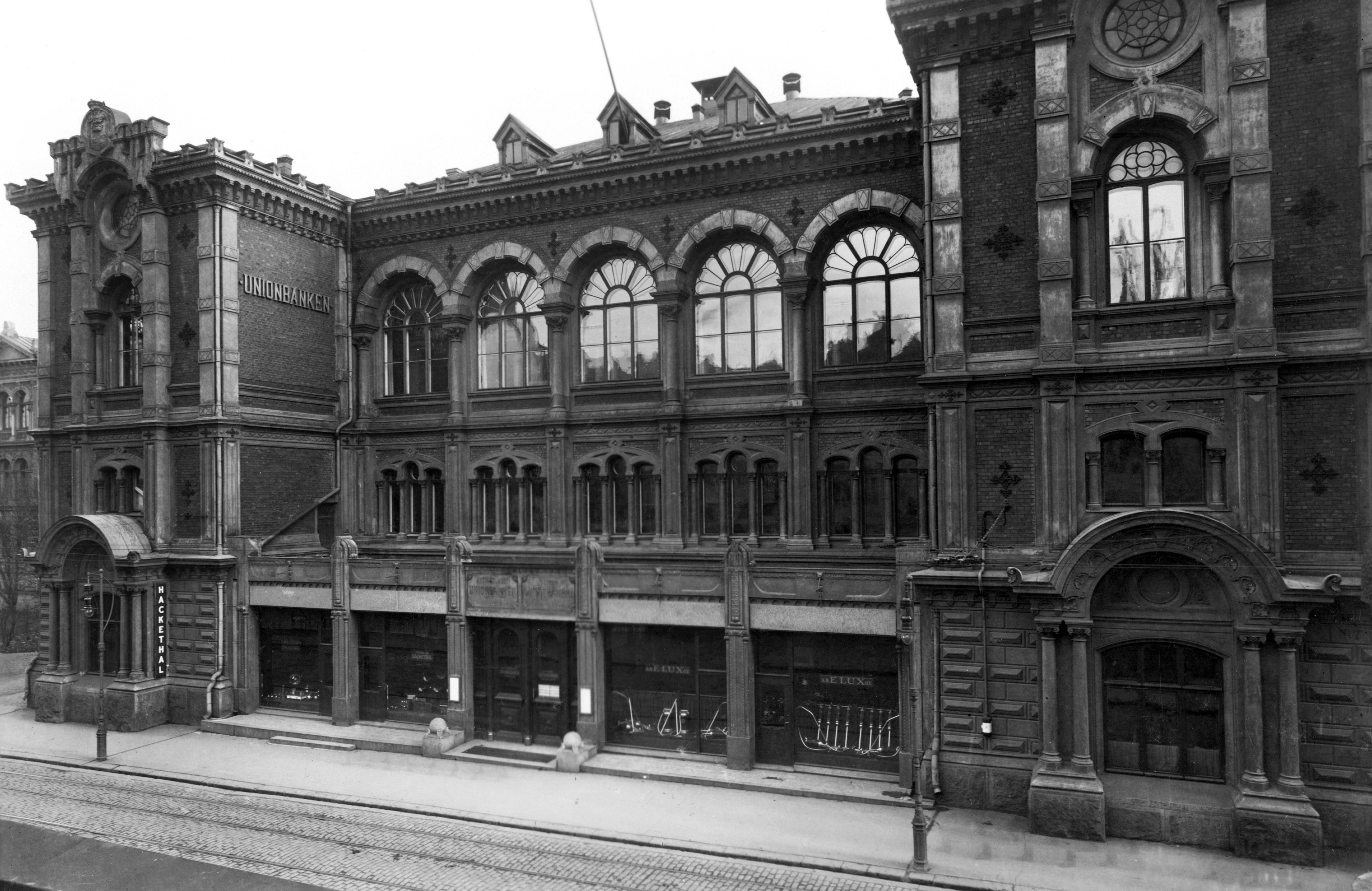 Helsingin VPK:n talo Hakasalmenkadulla. Vuonna 1889 valmistuneen rakennuksen on suunnitellut arkkitehti Theodor Höijer. VPK:n juhlasali oli Suomen yksikamarisen eduskunnan ensimmäinen istuntopaikka vuosina 1907–10, koska Säätytalo oli 200 edustajalle liian pieni. Rakennus on purettu vuonna 1967.